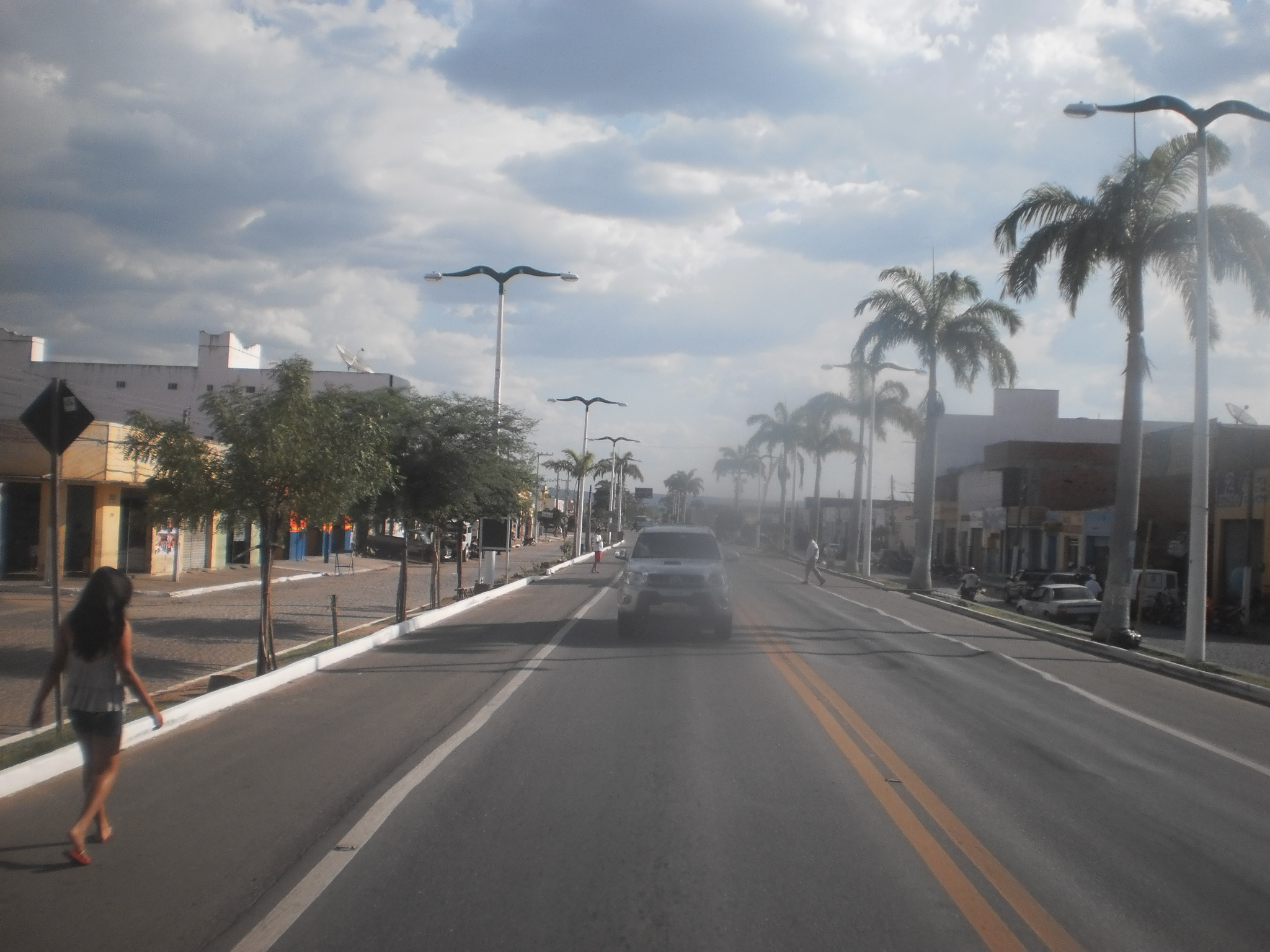 Vista parcial e panorâmica da cidade e da rodovia BR-116 em Brejo Santo, Ceará, Brasil.